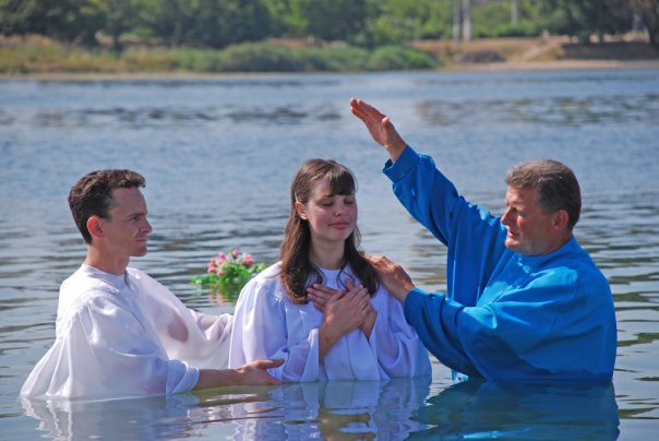 Святое водное крещение, ЕХБ.